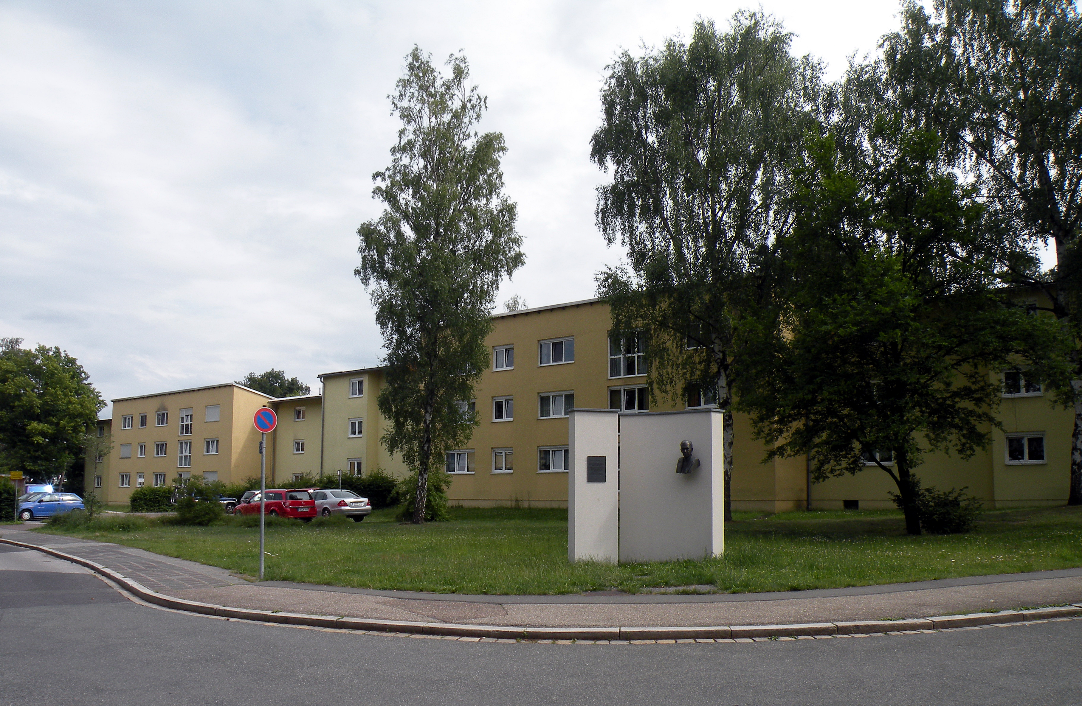 Дома, построенные по Плану Маршалла.Лангвассер.Нюрнберг